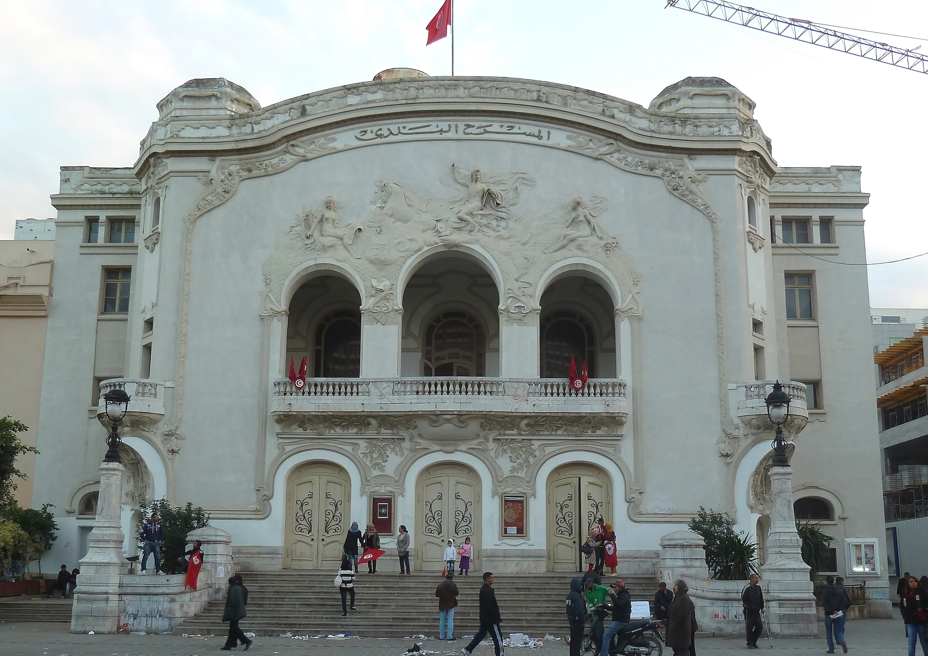 Théâtre municipal de la ville de Tunis